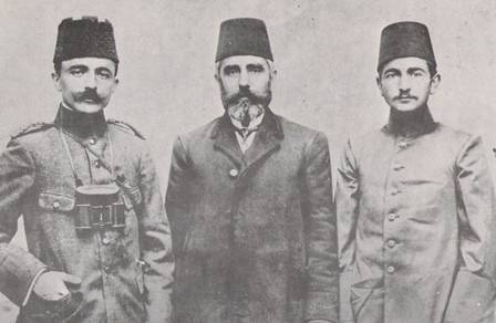 Enver Paşa (1881 – 1922), babası Ahmet Bey, kardeşi Nuri Killigil